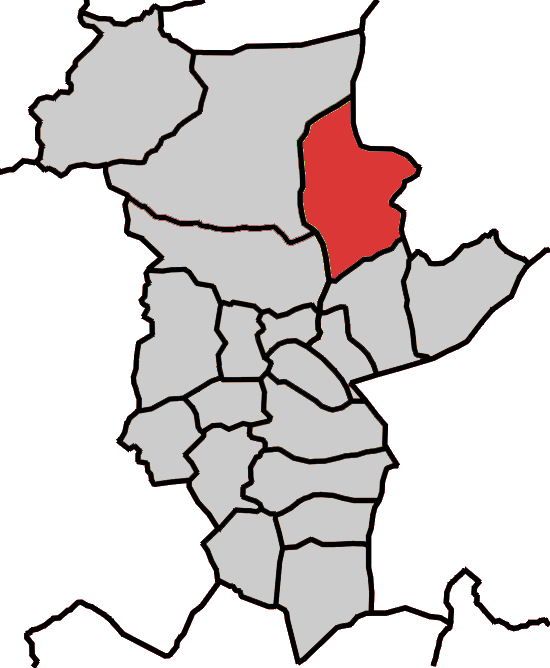 Situación da parroquia de Romariz no concello de Abadín